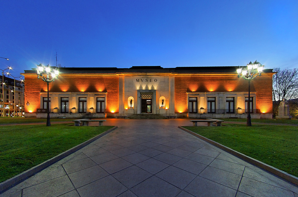 Fachada principal y entrada al edificio original del Museo de Bellas Artes de Bilbao.